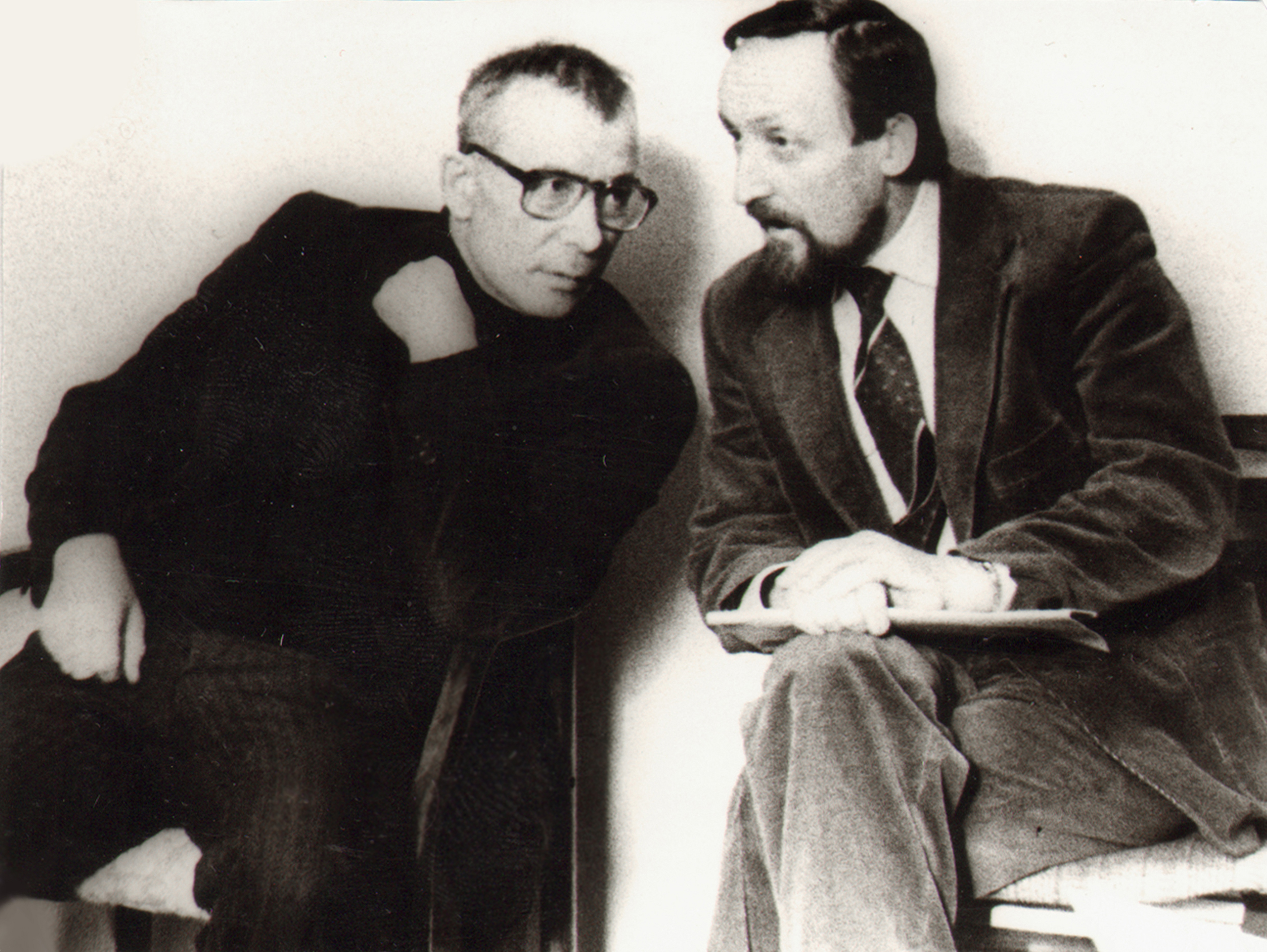 Учёные Ядов и Парыгин